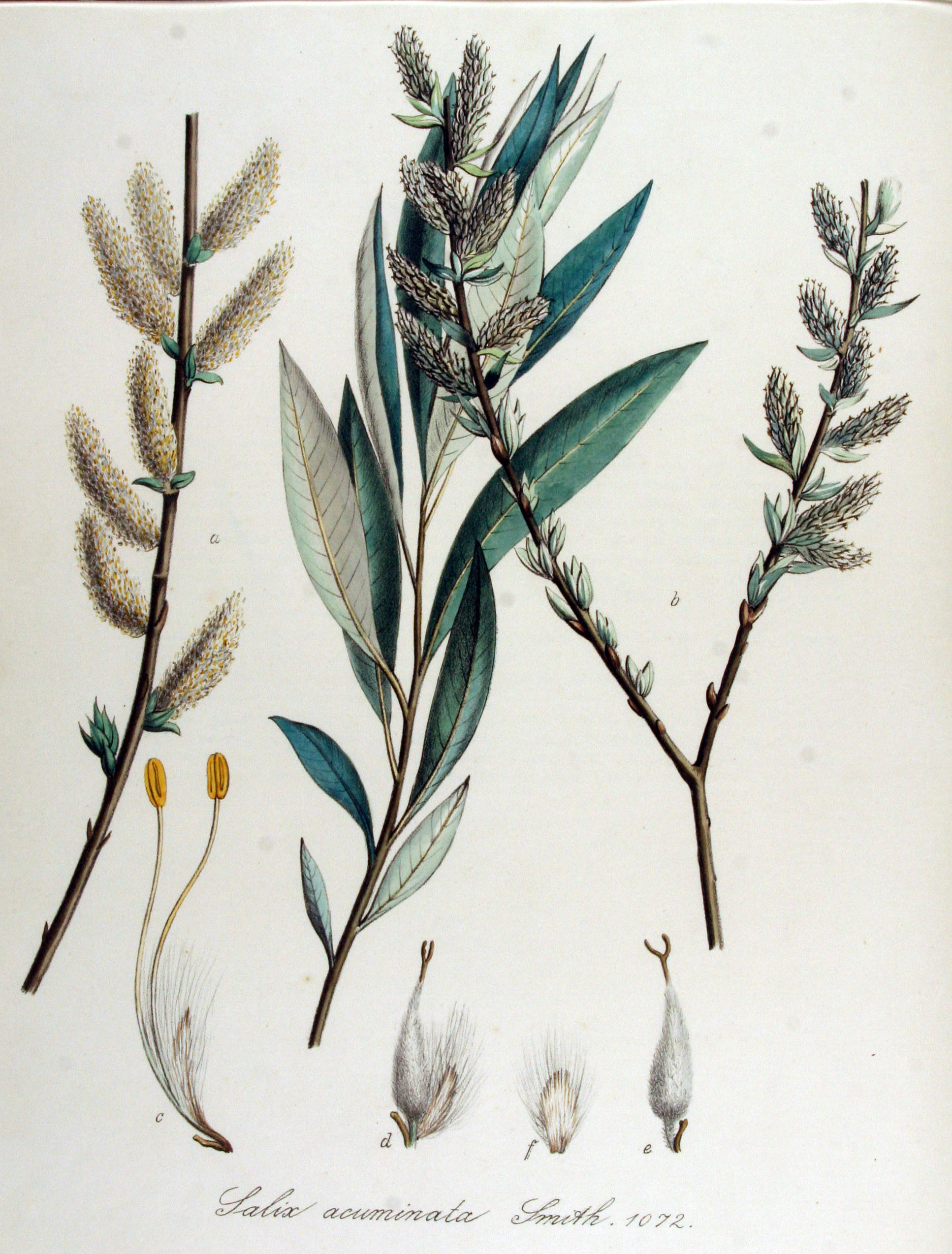 Salix × calodendron Wimm. (syn. Salix acuminata Sm.)